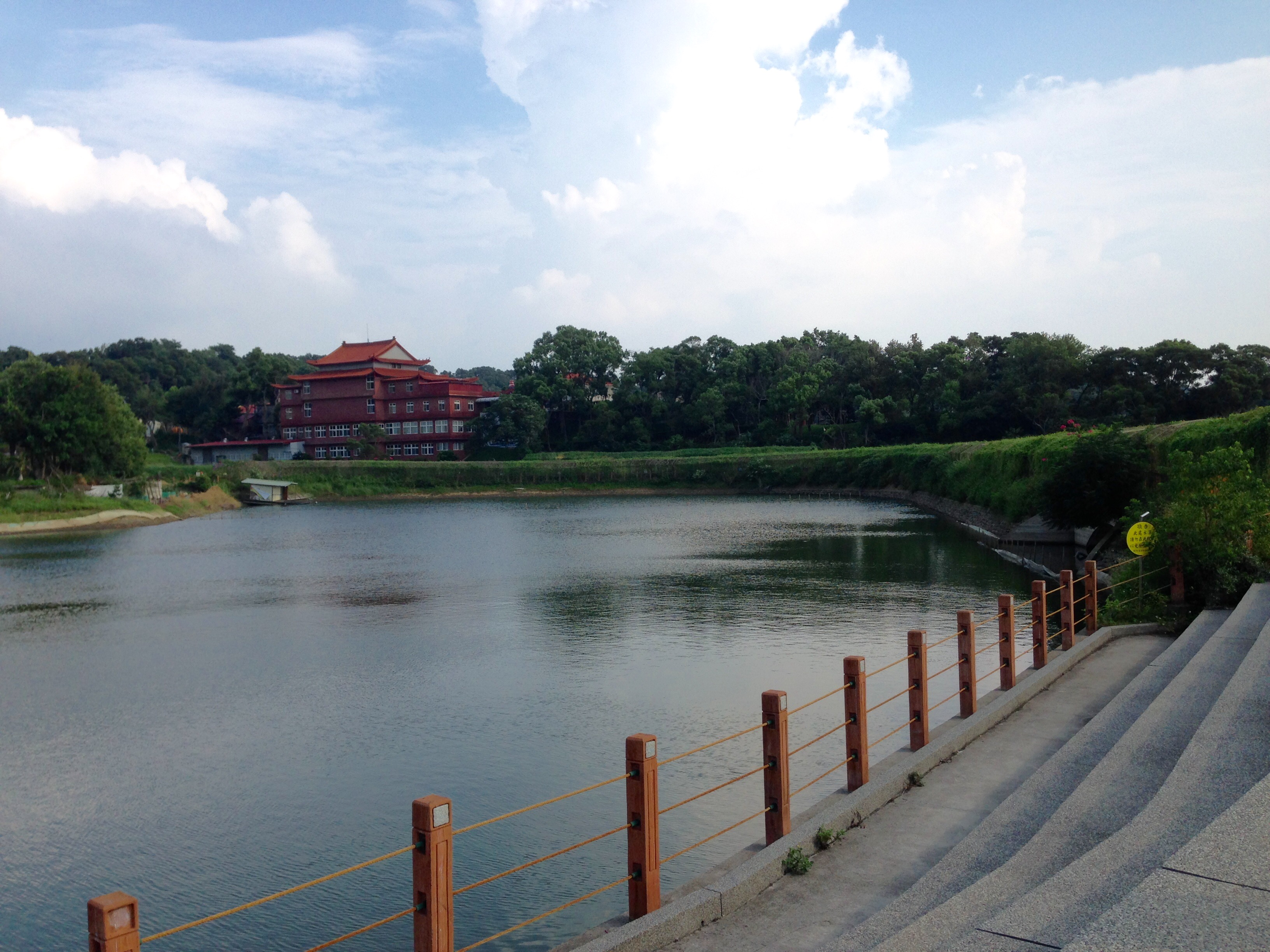 苗栗縣造橋鄉龍昇湖與龍湖宮